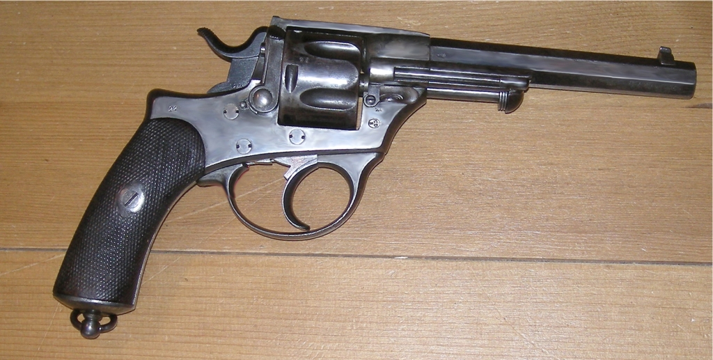 Ordonnanzrevolver 1872